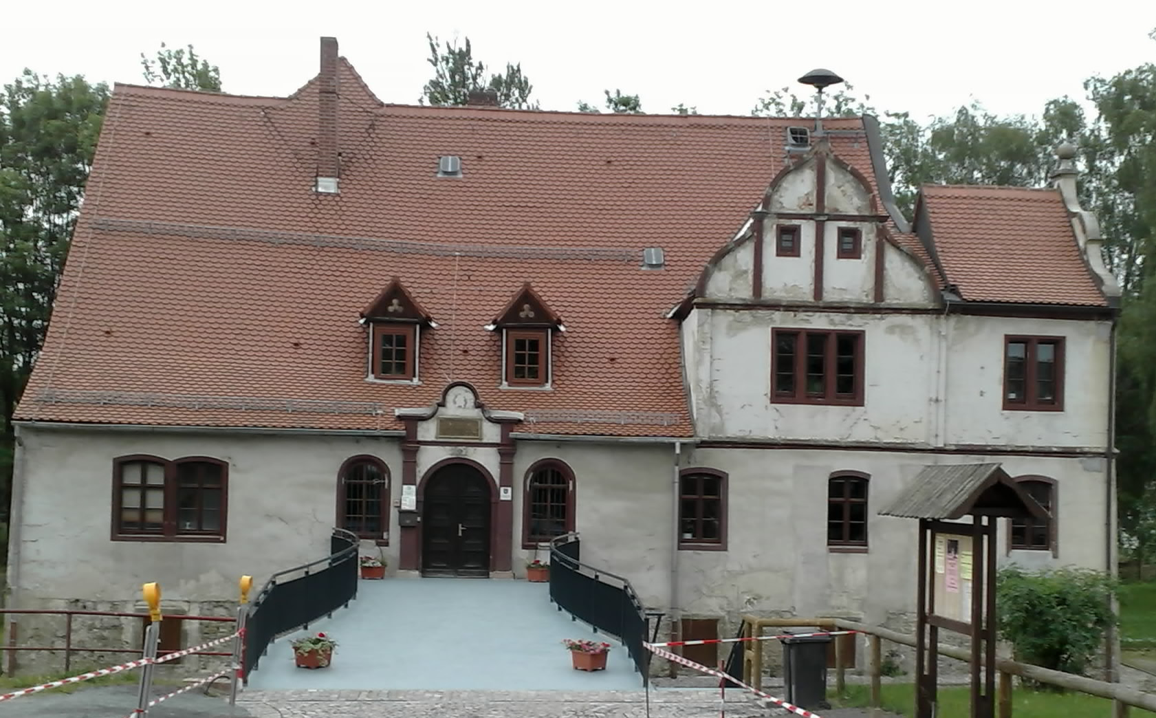 Der Türkenhof - so genannt, weil der Fürstensohn erst weit nach dem Ende des Krieges gegen die Türken wieder heimkehrte und man nicht wußte, ob er es wirklich war und für ihn - Hans, dem Türken - erbaut wurde. Heute ist er Sitz der Verwaltungesgemeinschaft Oppurg